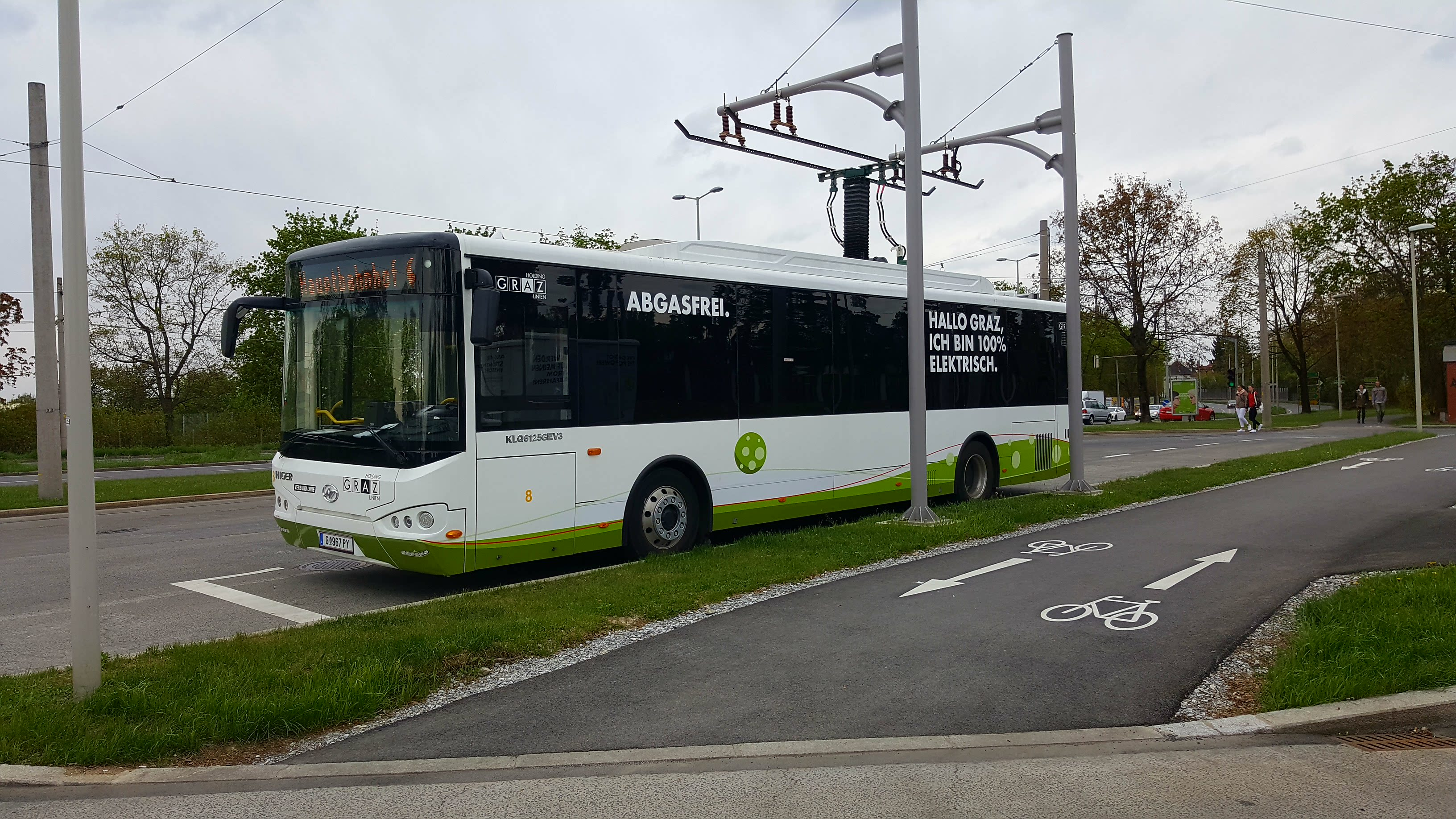 Grazer Elektrobus Nr. 8 beim Nachladen an der Ladestation Zentralfriedhof